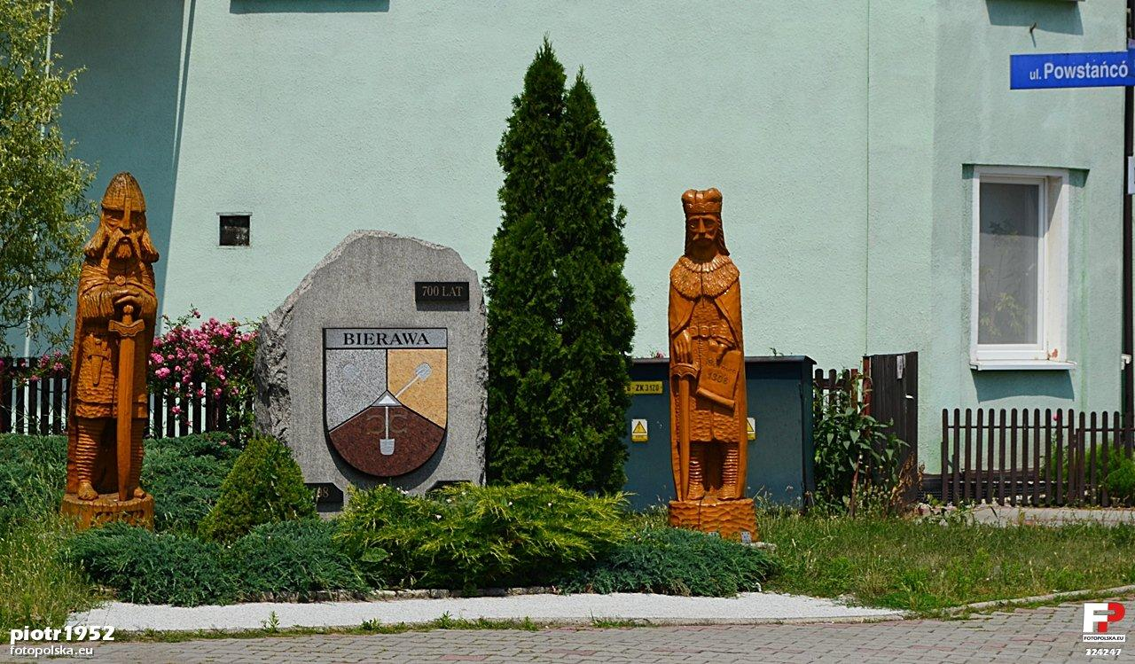 Pomnik na 700 - lecie Bierawy Pomnik stoi na skrzyżowaniu w centrum Bierawy.